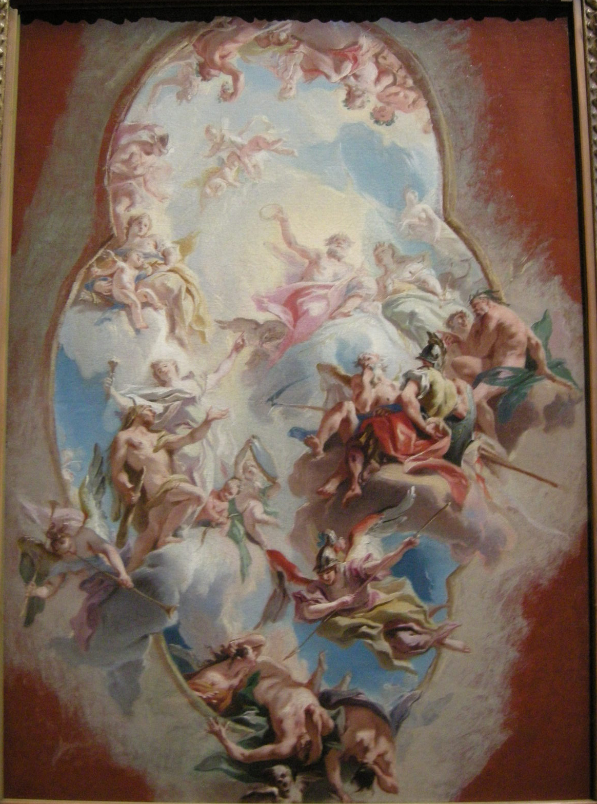 Carlo innocenzo carlone, hercole portato dalla conoscenza all'immortalità, 1726 circa